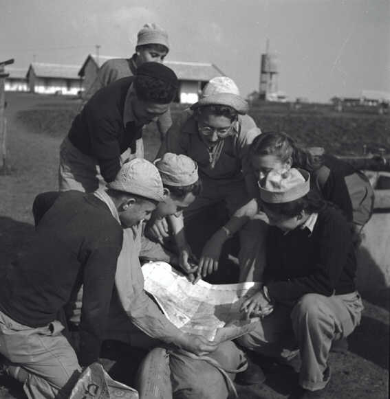 יבנה - מטיילים מעיינים במפה